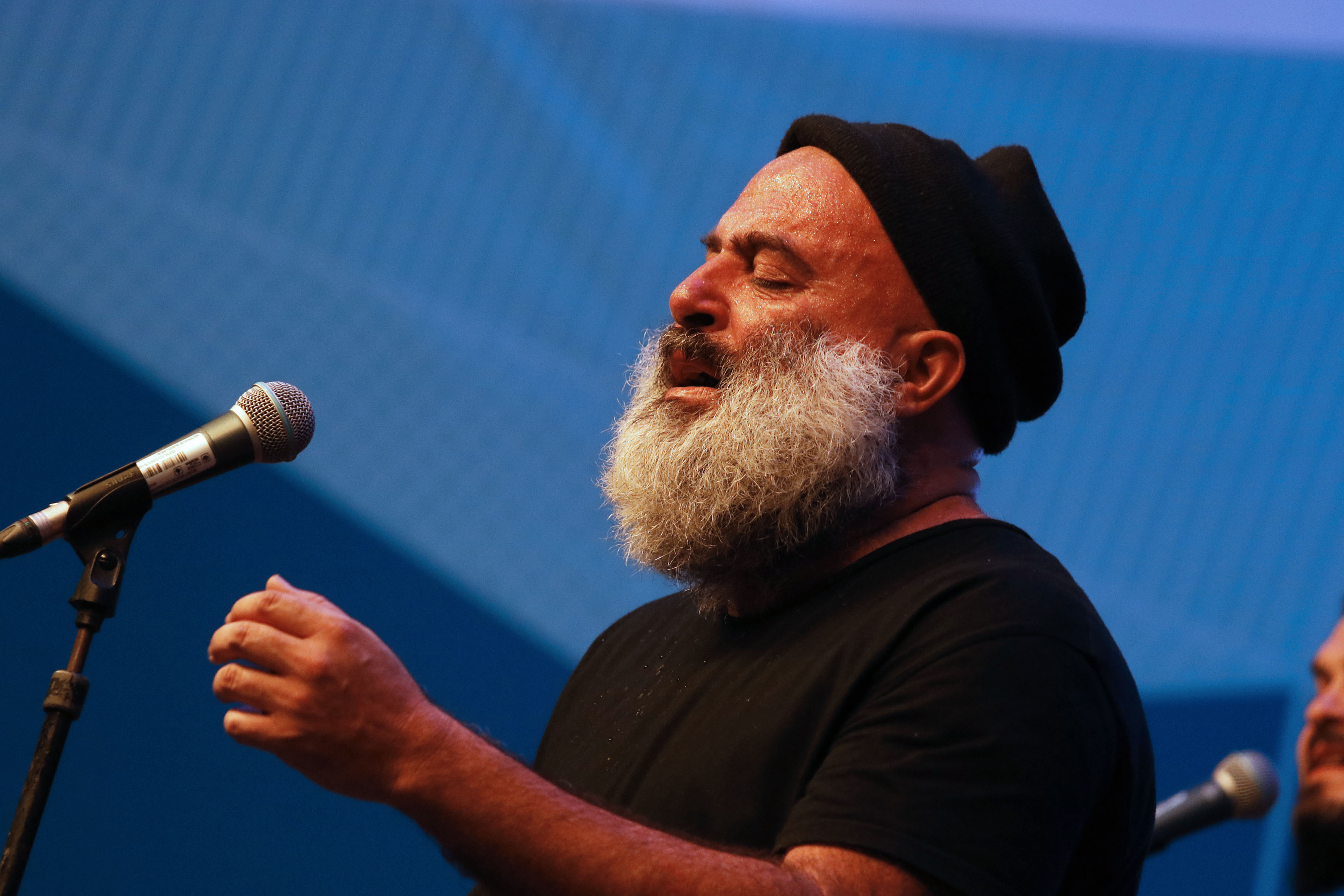 Domingo 15 de octubre del 2017. En el marco de la XVII Feria Internacional del Libro en el Zócalo 2017, en el Foro Rius, se realizó el concierto de la agrupación chilena Chico Trujillo. Fotografía: Tania Victoria/ Secretaría de Cultura CDMX